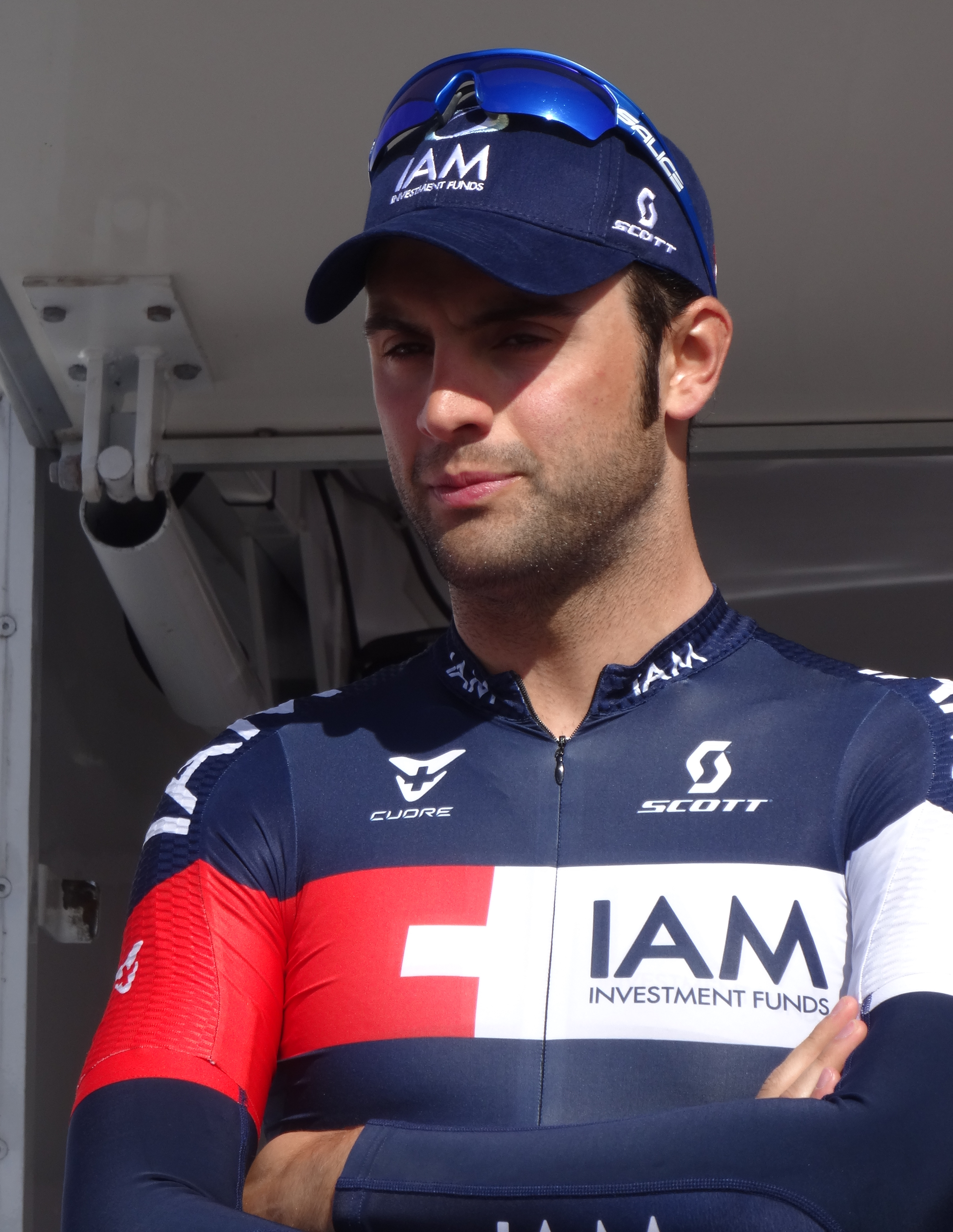 Reportage réalisé le jeudi 17 avril à l'occasion du départ et de l'arrivée du Grand Prix de Denain 2014 à Denain, Nord, Nord-Pas-de-Calais, France.